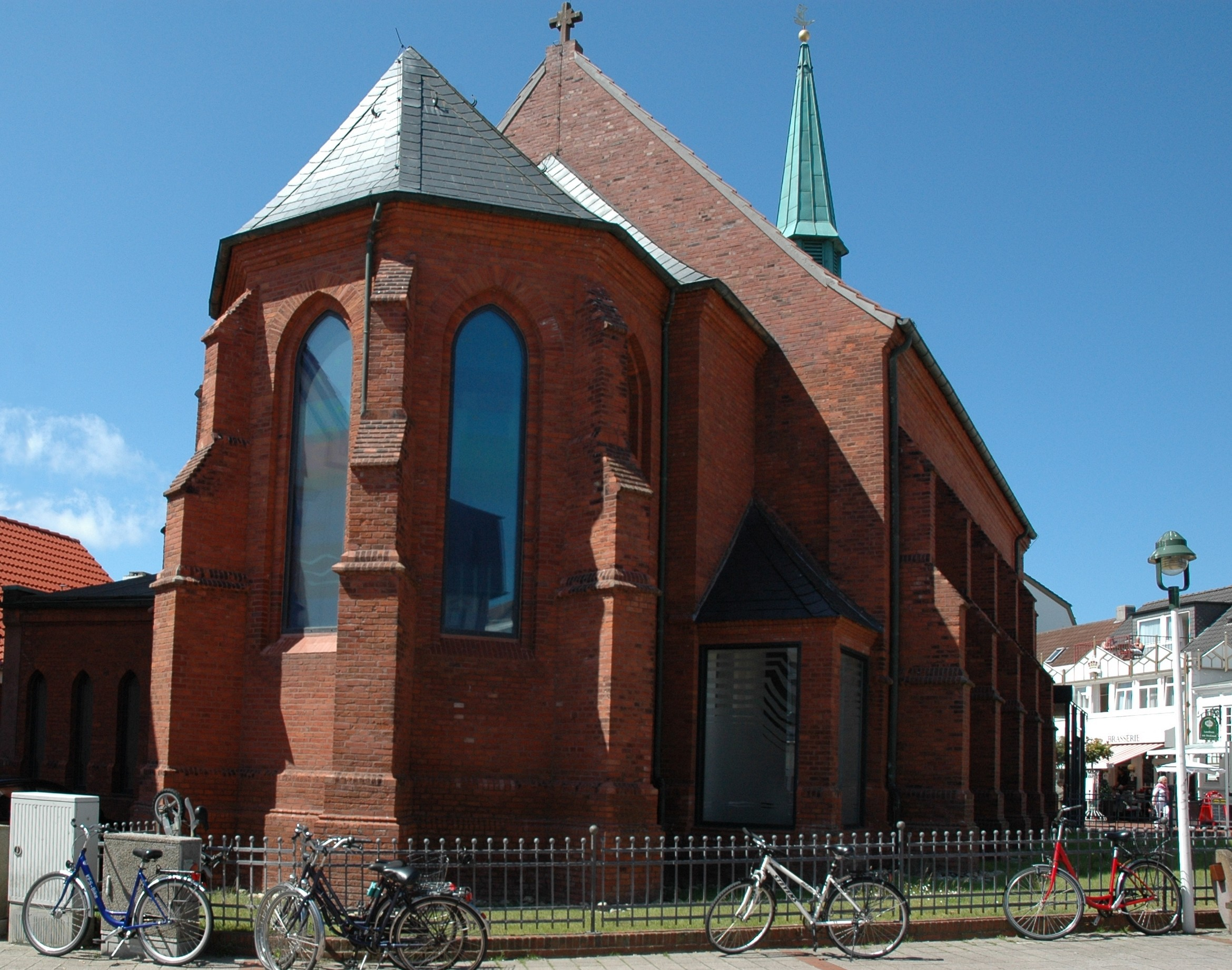 Stella Maris Norderney. Katholische Kirche St. Ludgerus auf Norderney. Aufgenommen vom Herrenpfad aus.